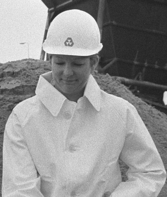 Aanvang werkzaamheden spoorverbinding Amsterdam RAI-Diemen vlnr: wethouder ten Have , burgemeester de Groot (Ouder-Amste burgemeester Dok van Weele (Diemen), de Jong